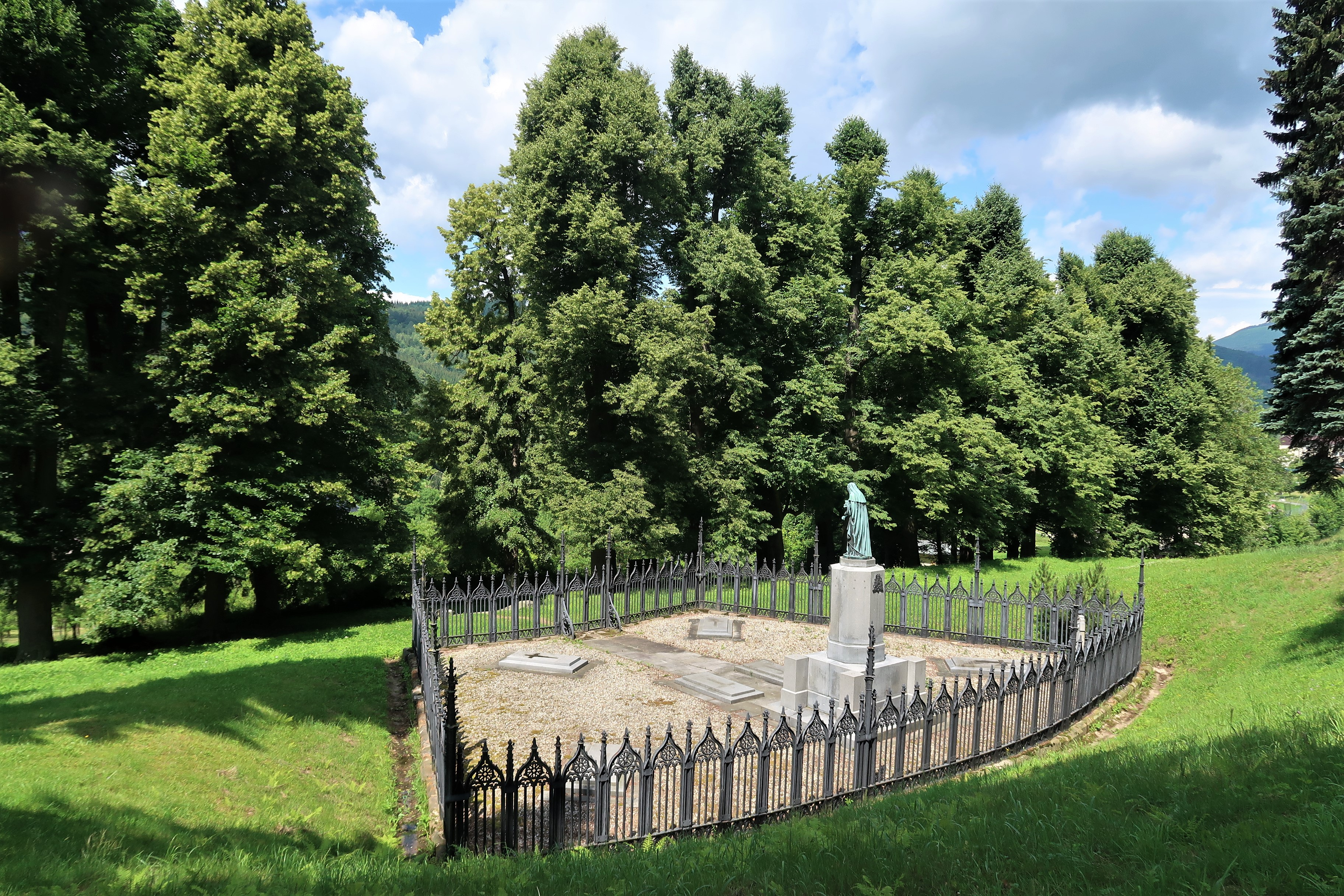 Hrobka podnikatelské rodiny Kleinů nad starým hřbitovem v Loučné nad Desnou, pohled od severovýchodu.